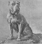 Cão da raça bullenbeisser, já extinta a alguns séculos.